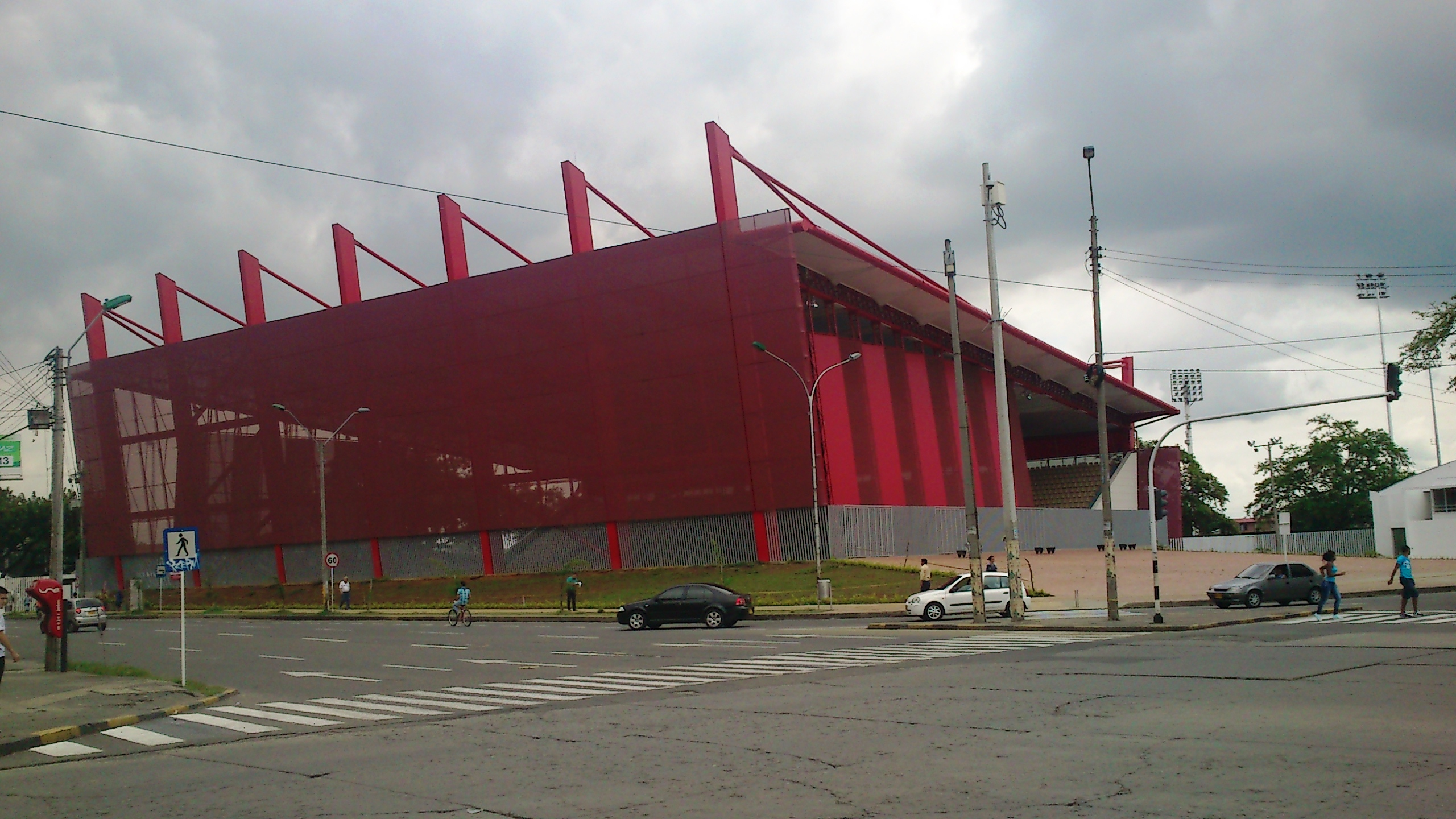 Estadio de Hockey Miguel Calero